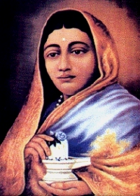 Malhar Rao Holkar, Maharani of Indore